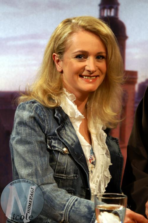 NICOLE in der N24-Sendung "UM GOTTES WILLEN / N24-Ethik" Photographer: Peter Ziegler